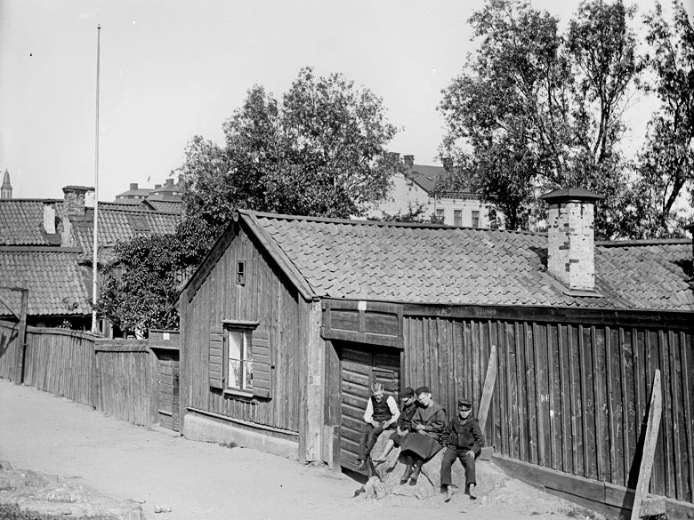 Blockmakarens hus, Stigbergsgatan 21, Bilden är tagen någon gång mellan år 1905 och 1915. På den tiden bodde en blockmakare, Gustav Andersson i fastigheten med fru och barn.